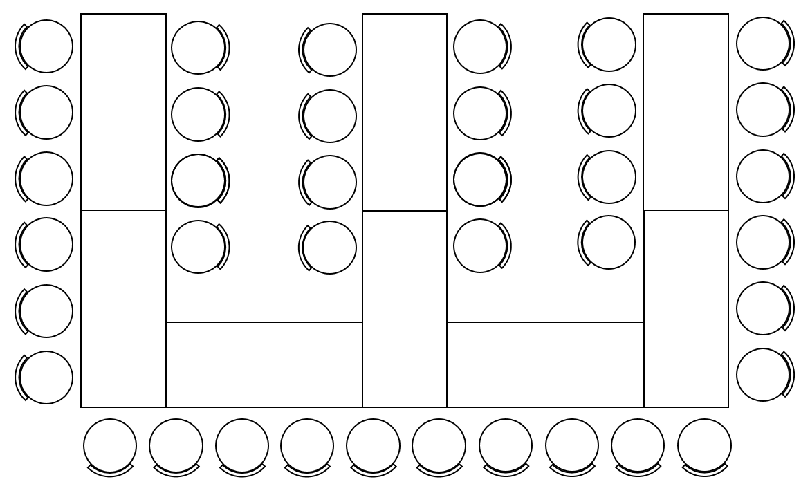 Bordoppsett E-bord